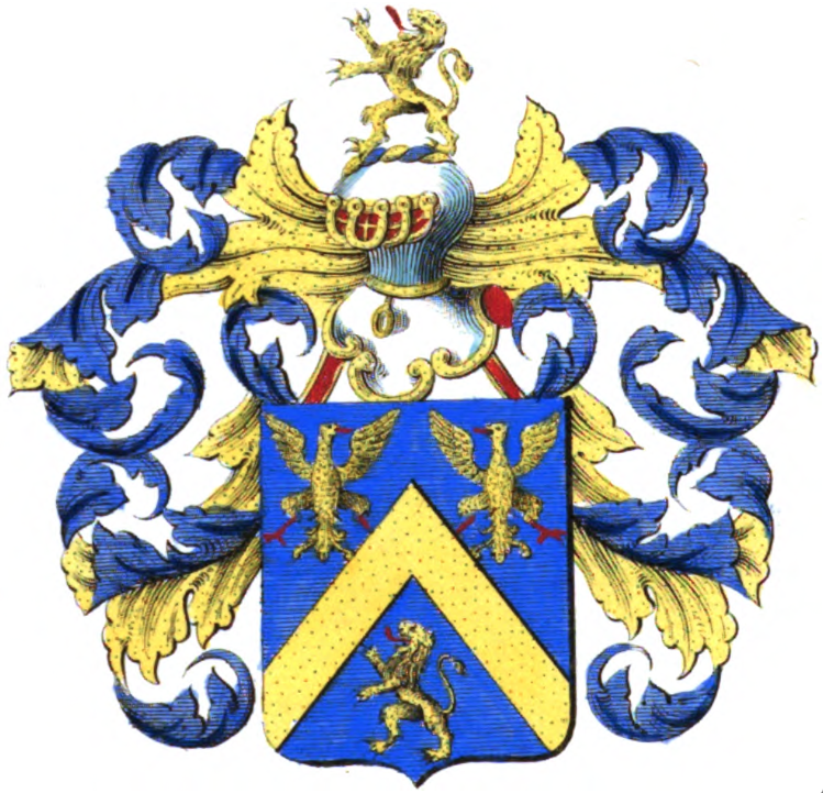 Armoiries de la famille Cossée